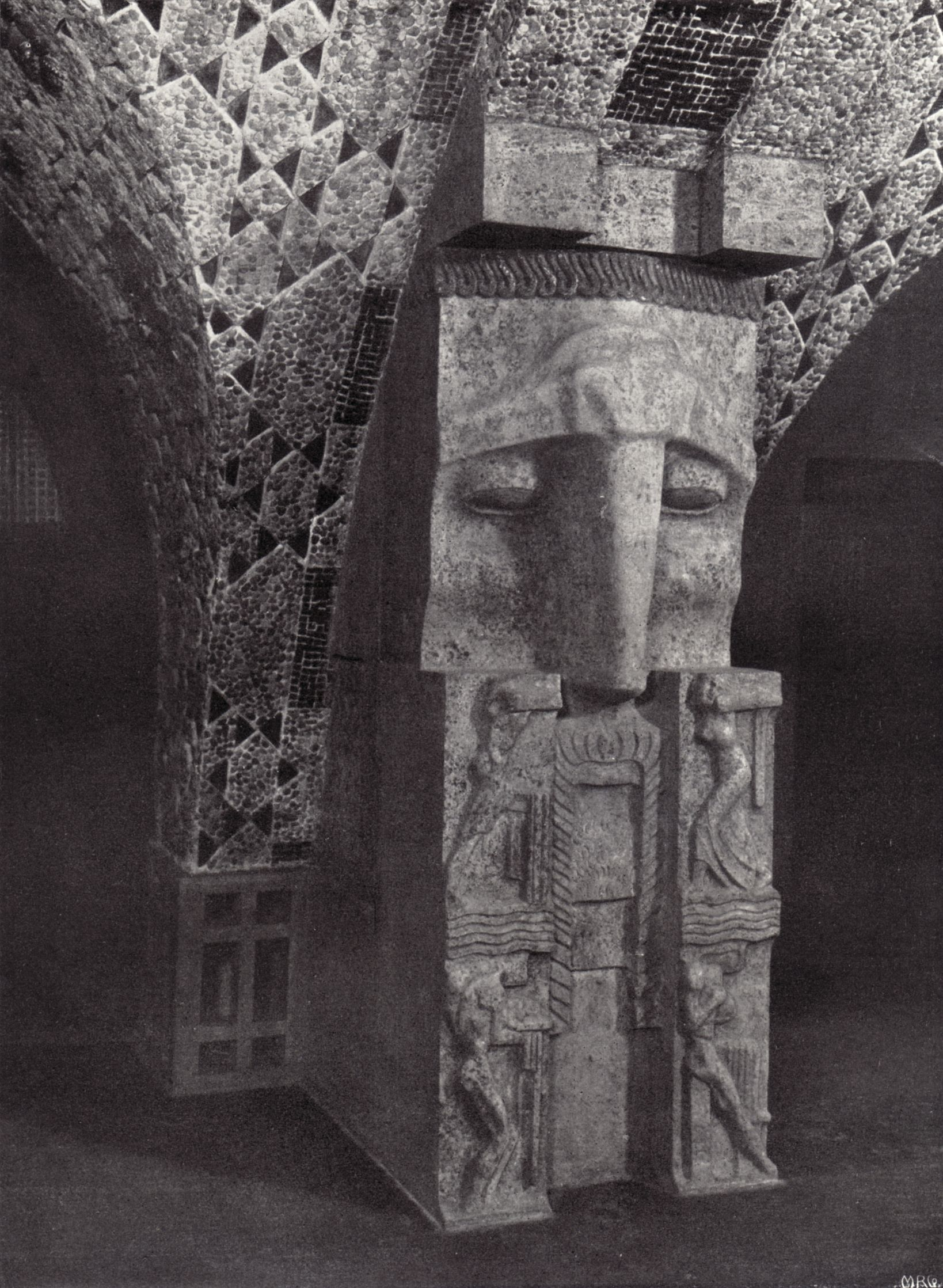 Berlin - Weinhaus Rheingold, Gewölbepfeiler gestaltet durch Franz Metzner im Steinsaal